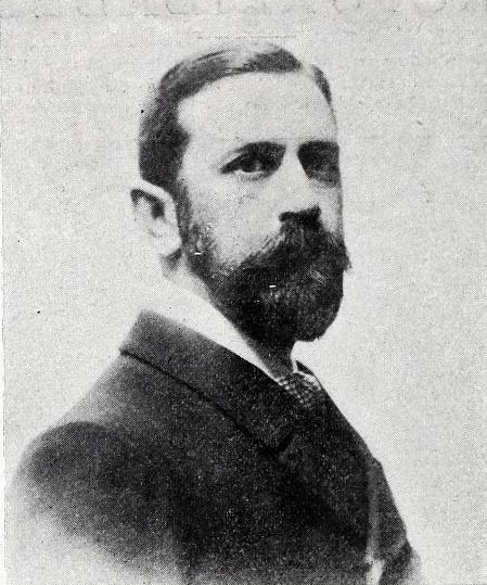 Francisco Acebal.